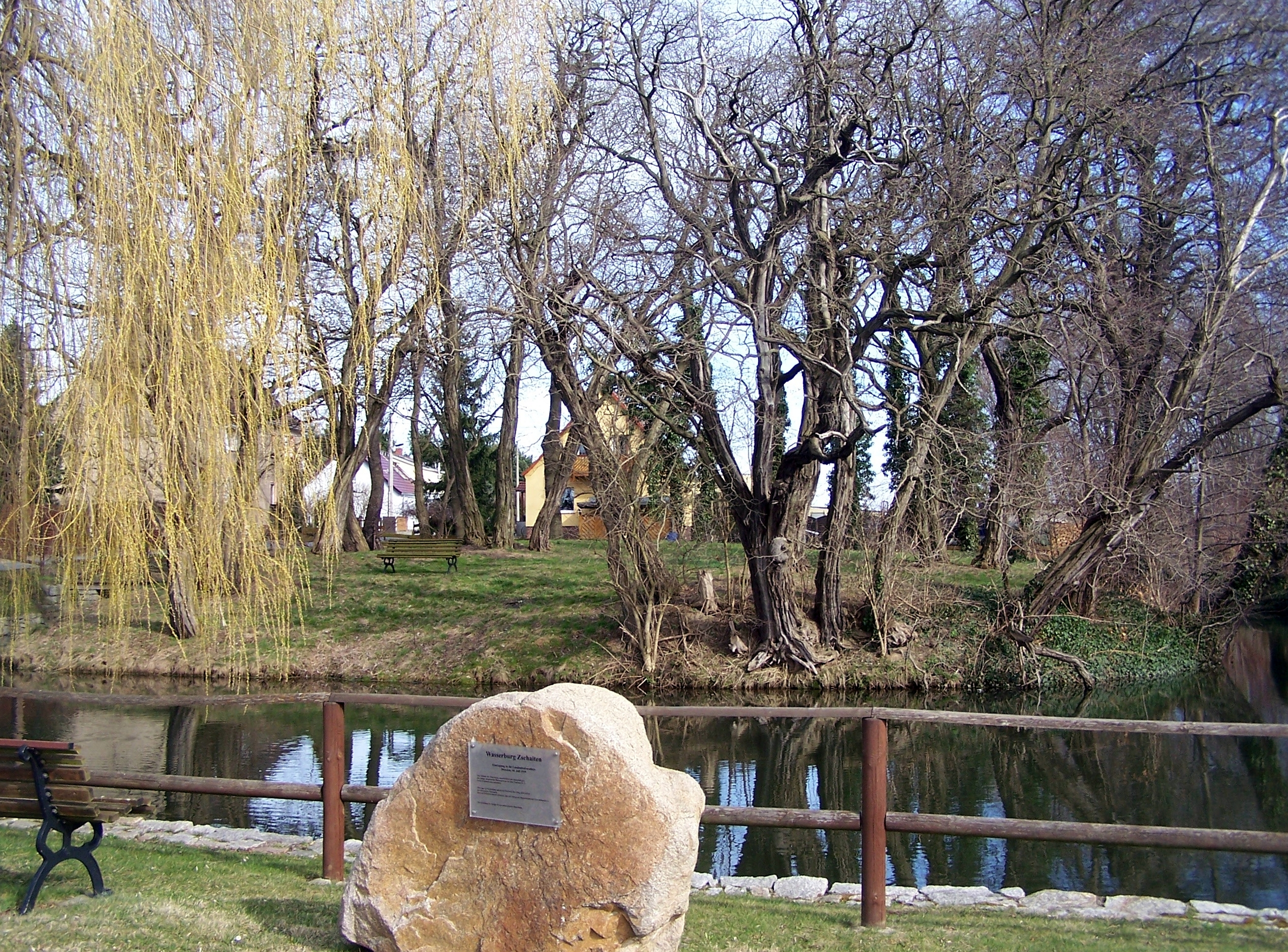 frühere Wasserburg Zschaiten, Gemeinde Nünchritz, Landkreis Meißen